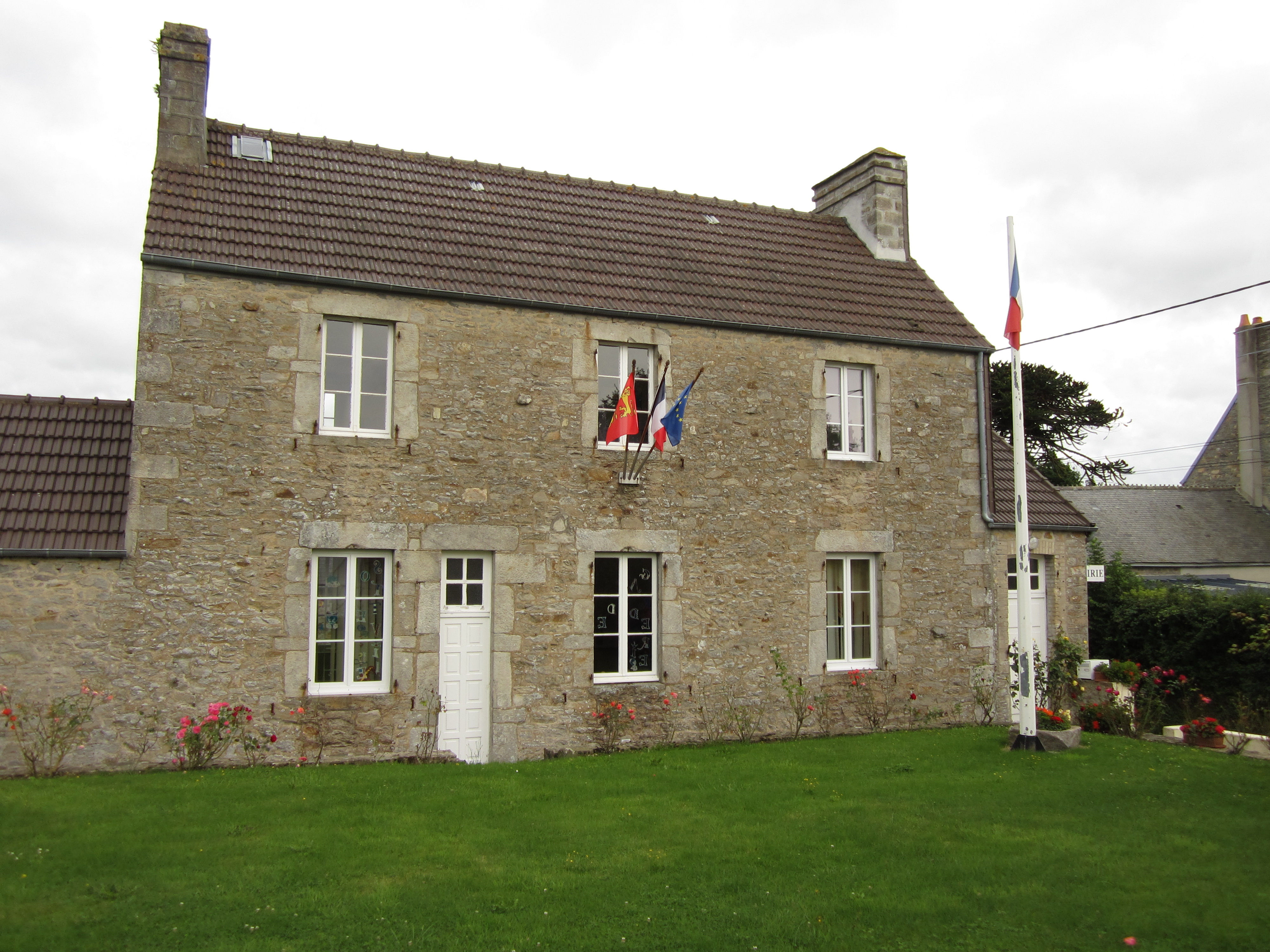 Mairie de Sotteville